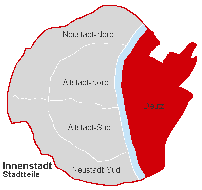 Lagekarte Deutz im Stadtbezirk Köln-Innenstadt